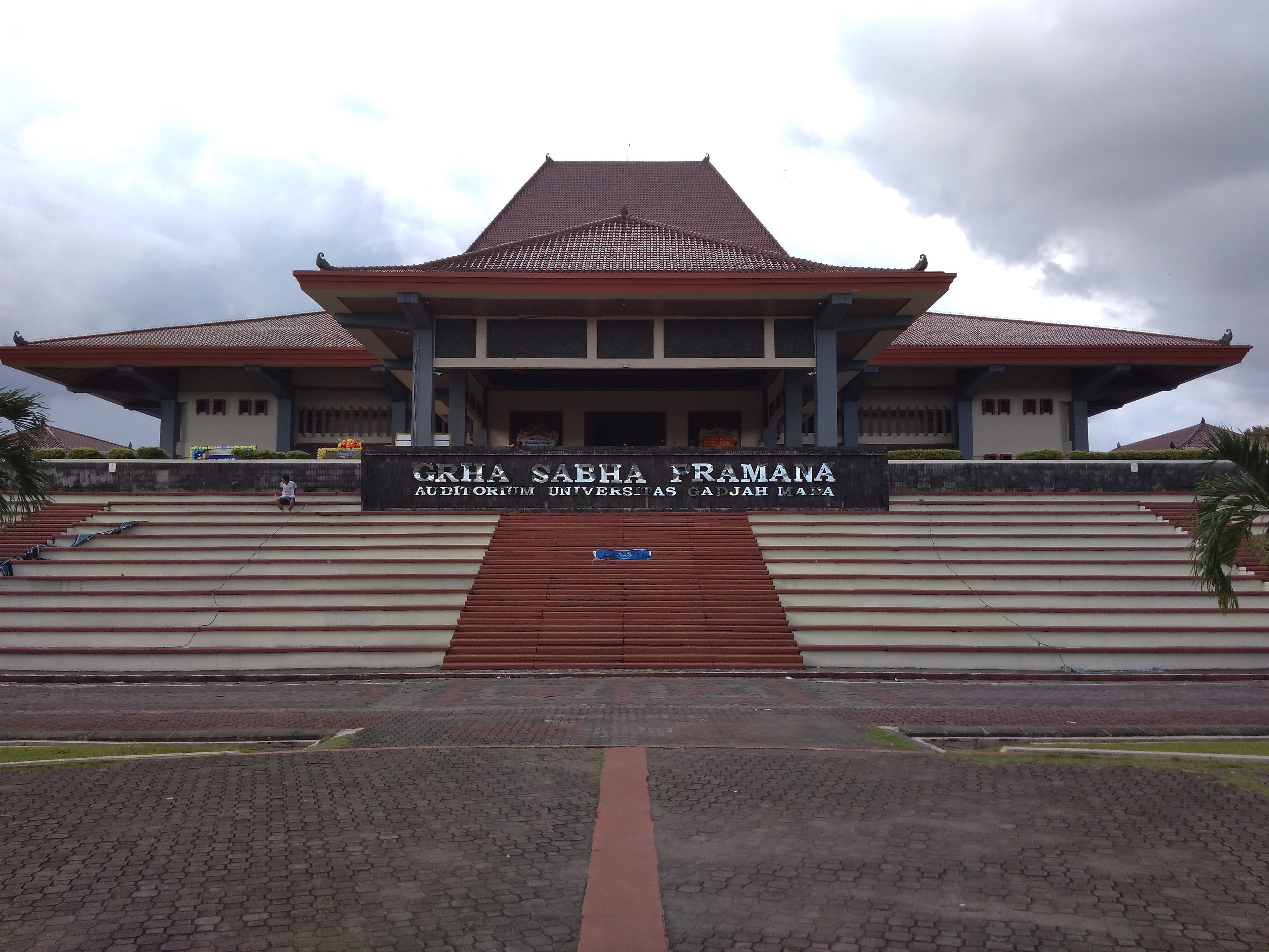 Gedung Grha Sabha Pramana (GSP)